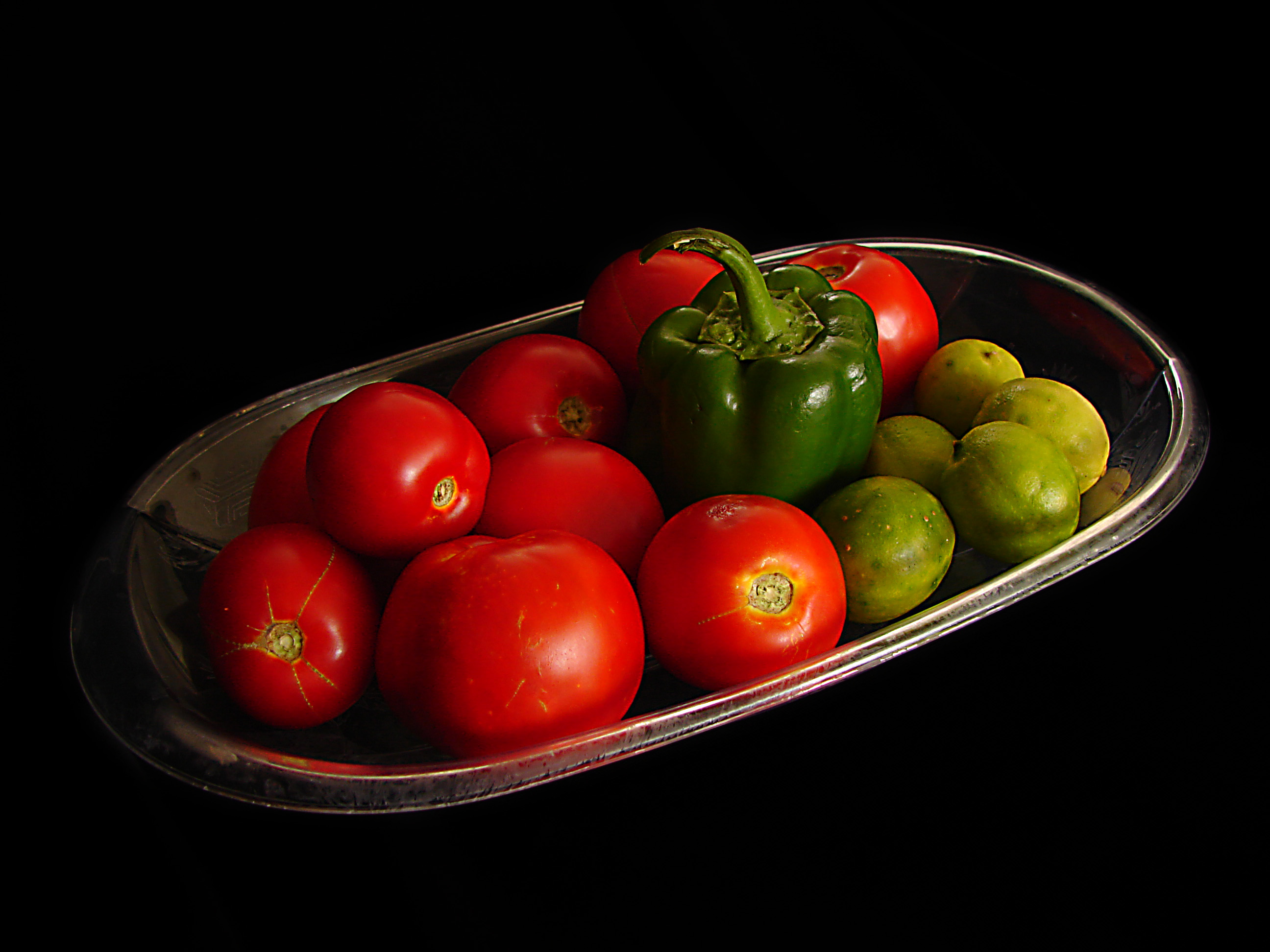 Organic vegetables